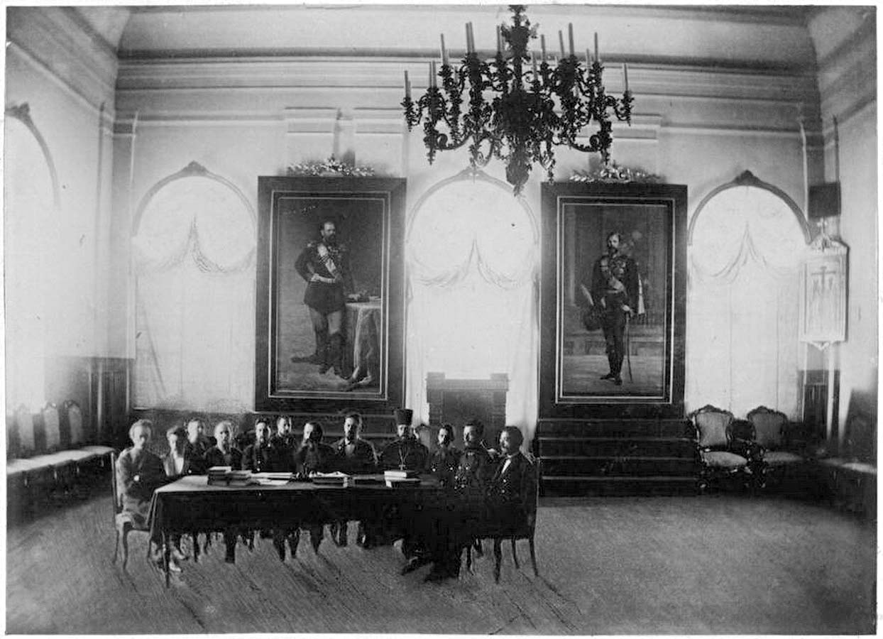 Актовый зал тюменского Александровского реального училища